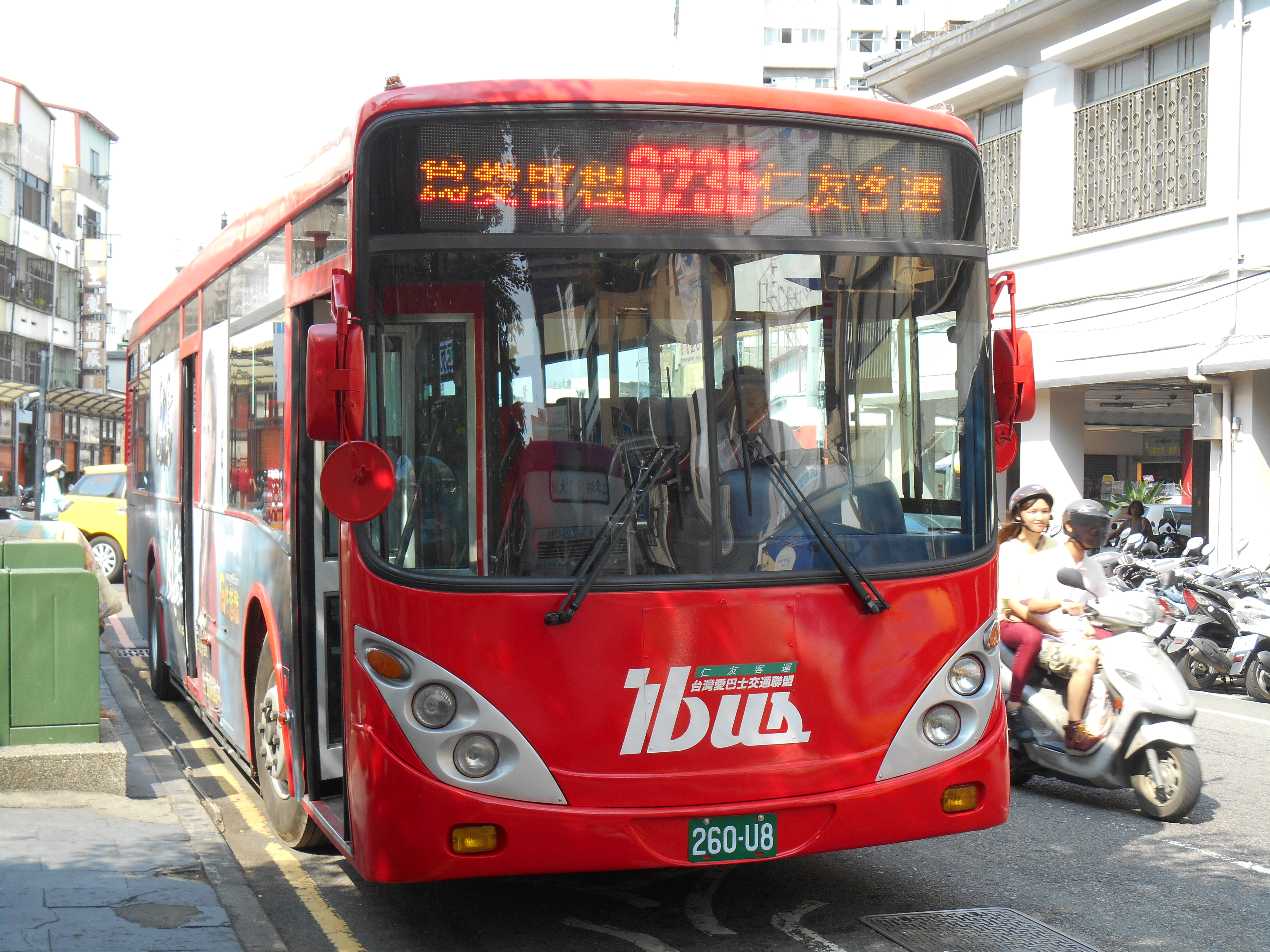 中文（台灣）: 仁友客運2006年原臺北客運日野ERK2JRL大客車260-U8行駛公路客運6235路。